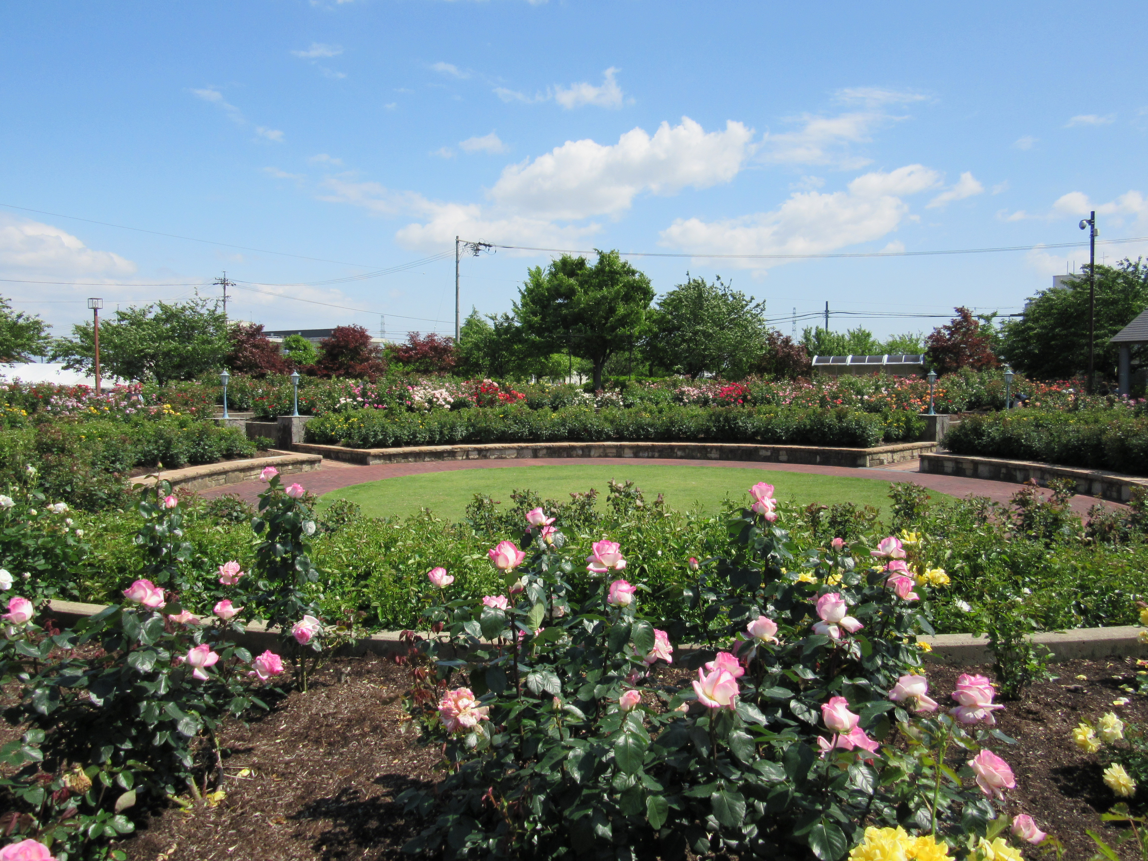 大野町バラ公園